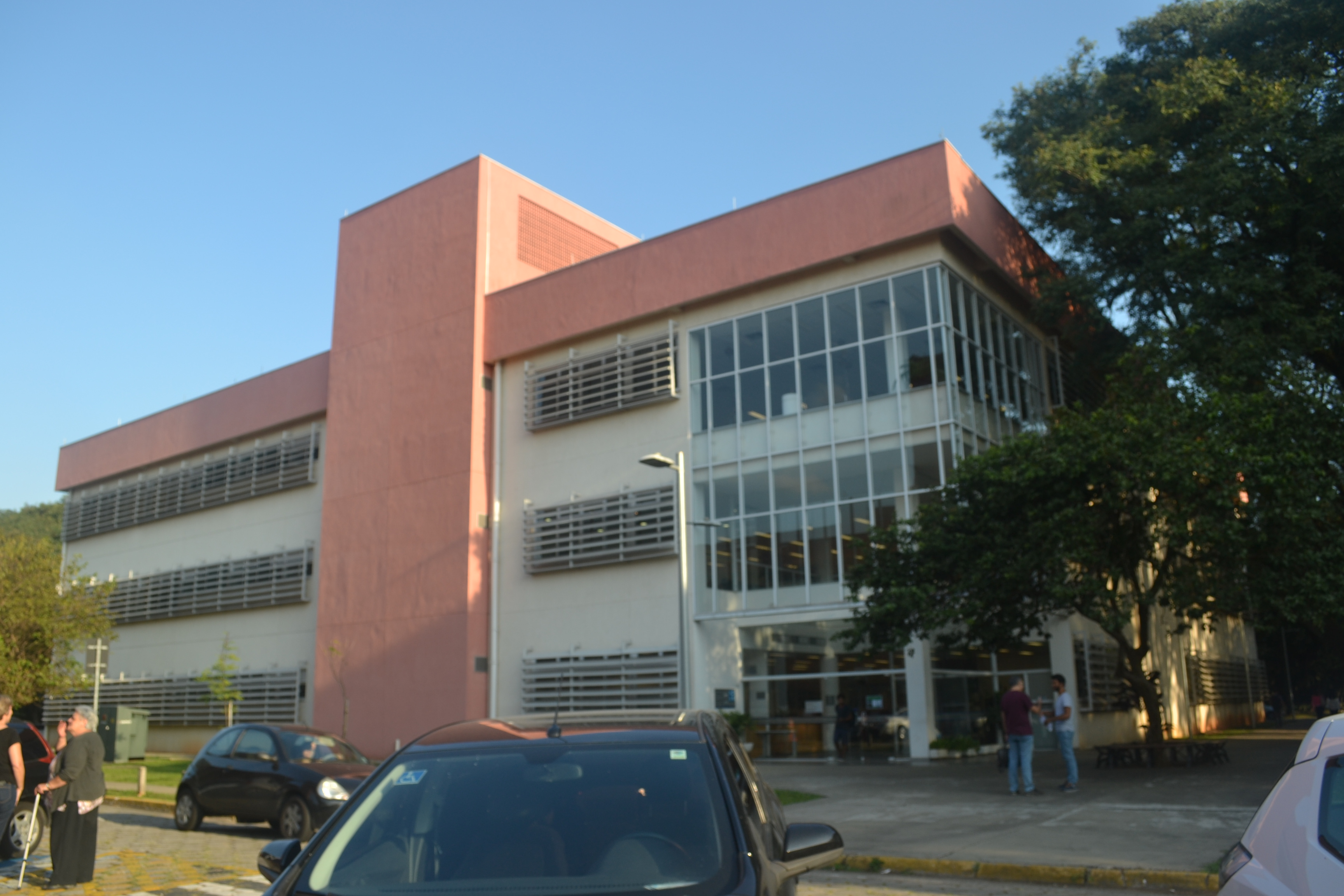 Biblioteca da Faculdade de Educação da USP localizada à frente do prédio da Faculdade de Educação da USP.